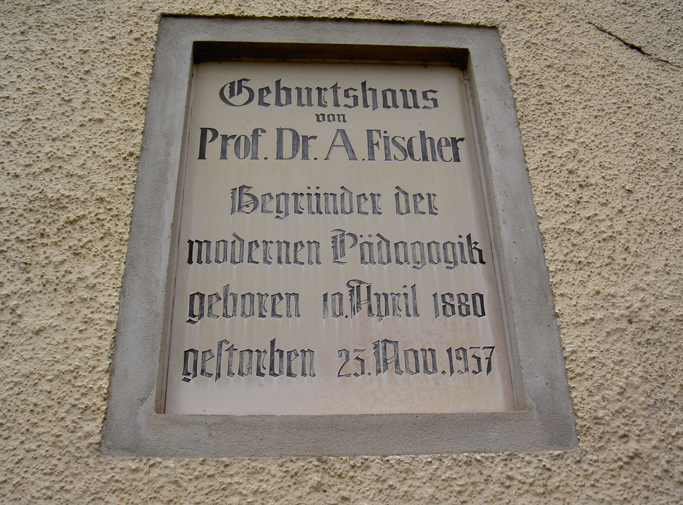 Gedenktafel für Alois Fischer in der Herrenstraße 5 in Furth im Wald